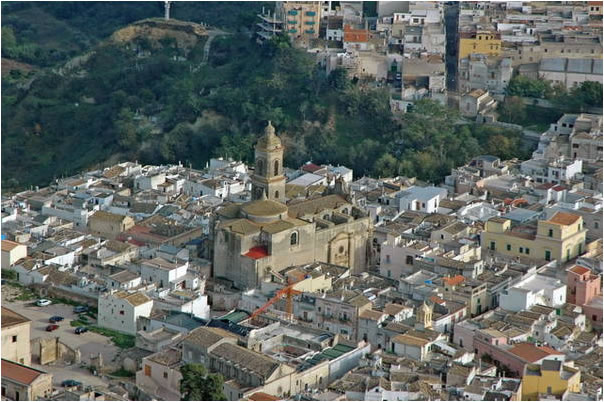 Panorama del centro storico di montescaglioso